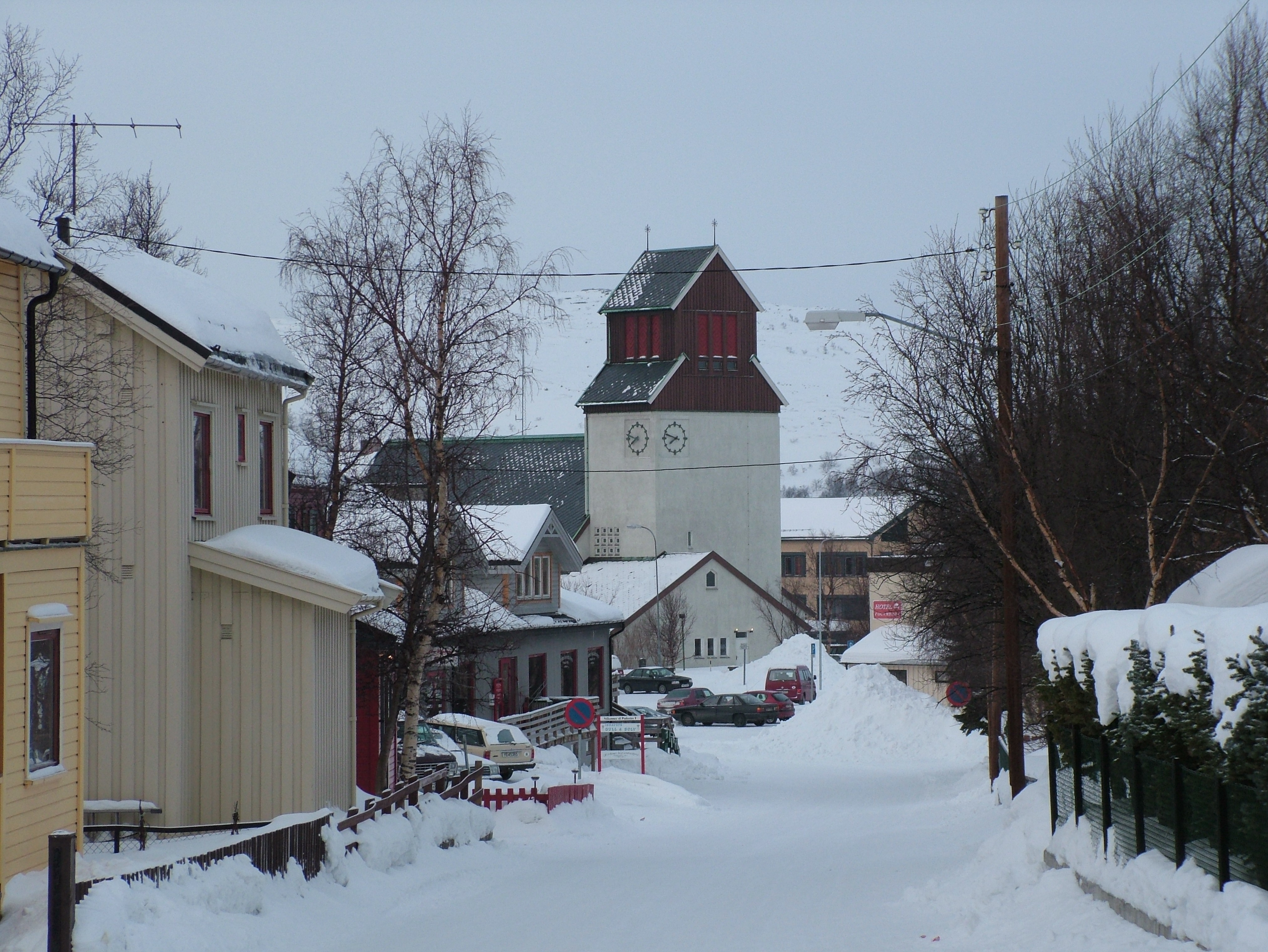 Kirkenes, Finmark, Norwegen, die Kirche